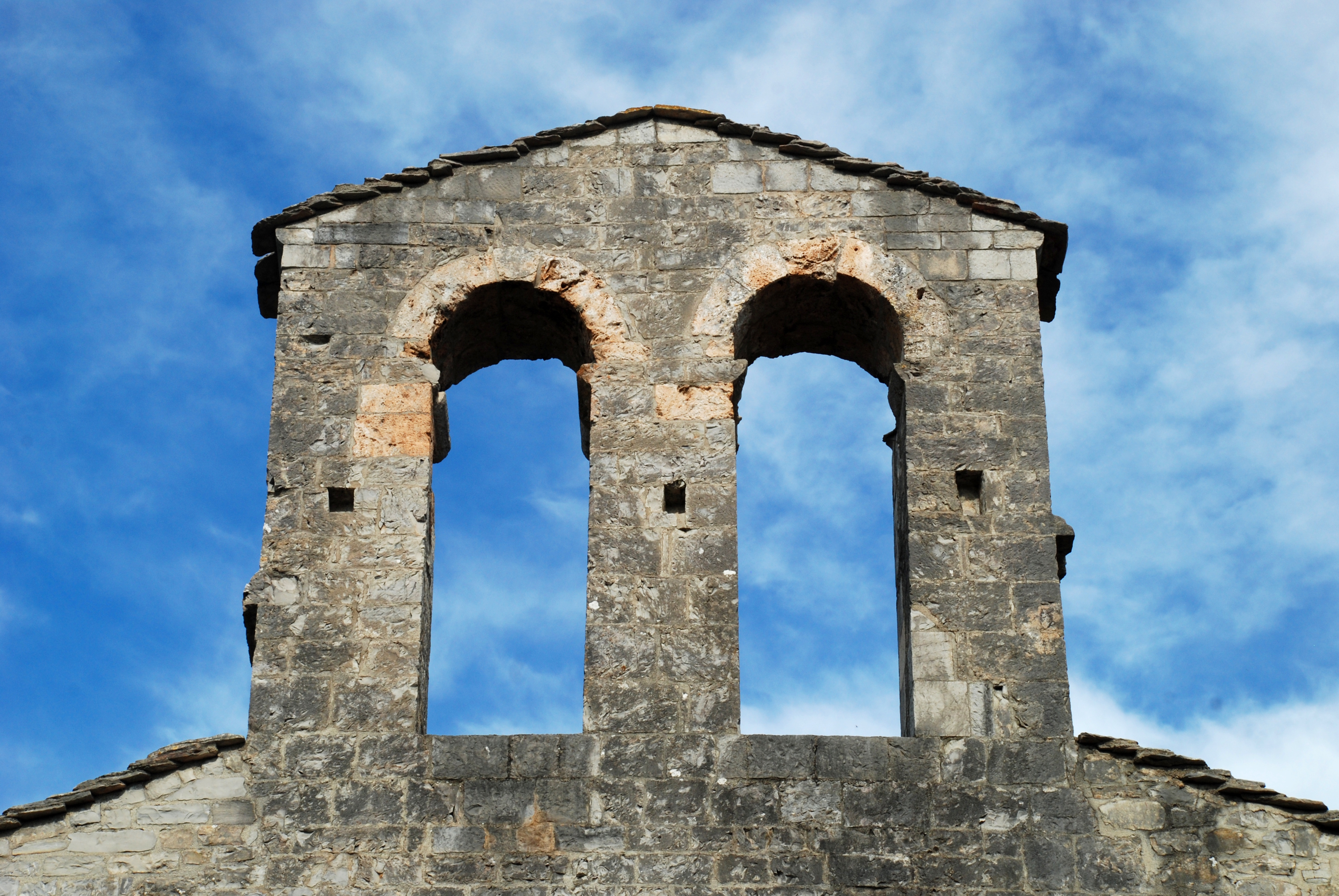 France - Hérault - Brissac - Chapelle Saint-Étienne d'Issensac